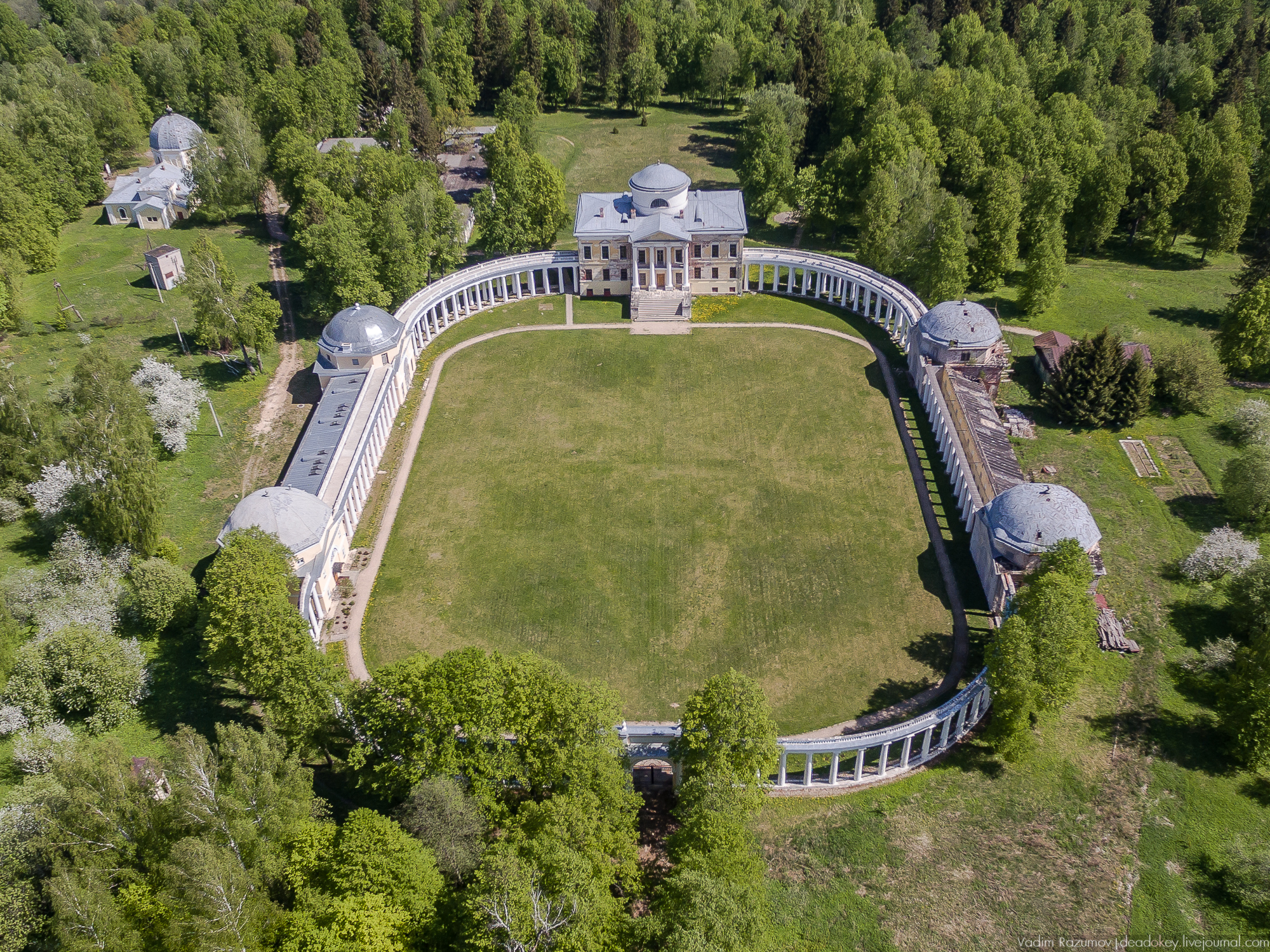 Усадьба Знаменское-Раек Ф.И.Глебова-Стрешнева: Раёк, Торжокский район, Тверская область